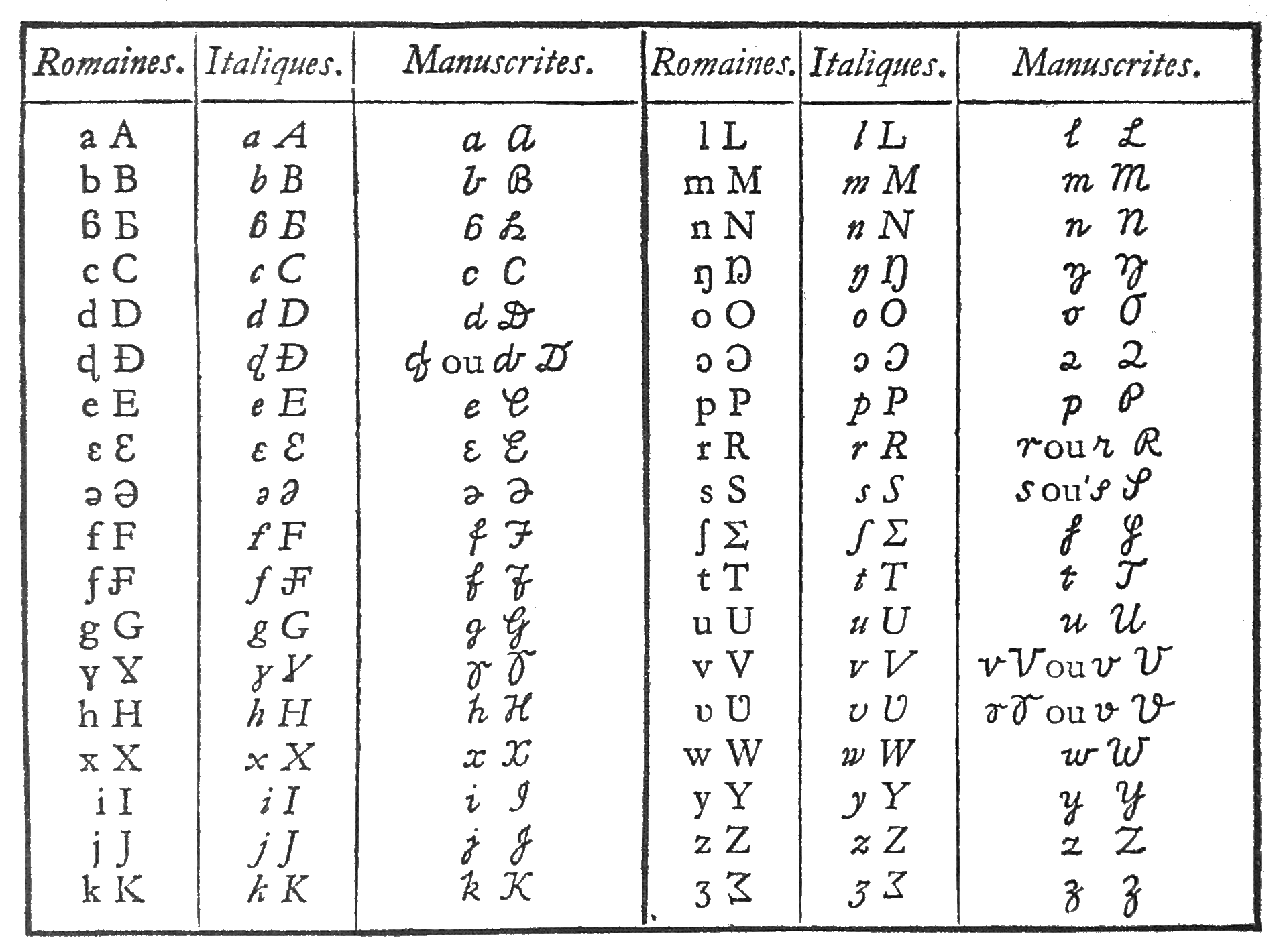 tableau des Majuscules et formes écrites de l’Orthographe pratique des langues africaines, 1930, page 18. (voir Alphabet international africain). Aussi publié en anglais [1])